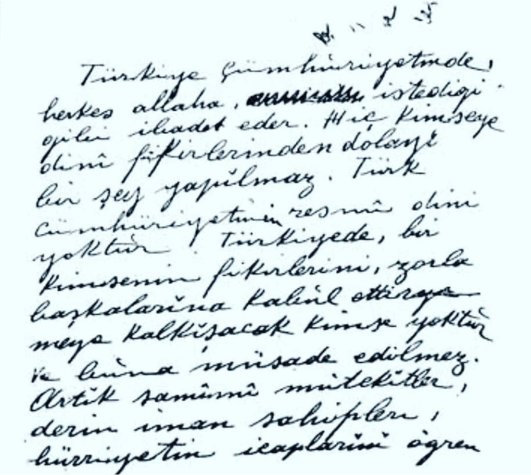 "Türkiye Cumhuriyeti'nde herkes Allah'a istediği gibi ibadet eder. Hiç kimseye dinî fikirlerinden dolayı bir şey yapılmaz. Türk Cumhuriyeti'nin resmî dini yoktur. Türkiye'de, bir kimsenin fikirlerini zorla başkalarına kabul ettirmeye kalkışacak kimse yoktur ve buna müsaade edilmez. Artık samîmî mutekitler, derin iman sahipleri, hürriyetin icaplarını öğren." - Medeni Bilgiler, Mustafa Kemal Atatürk